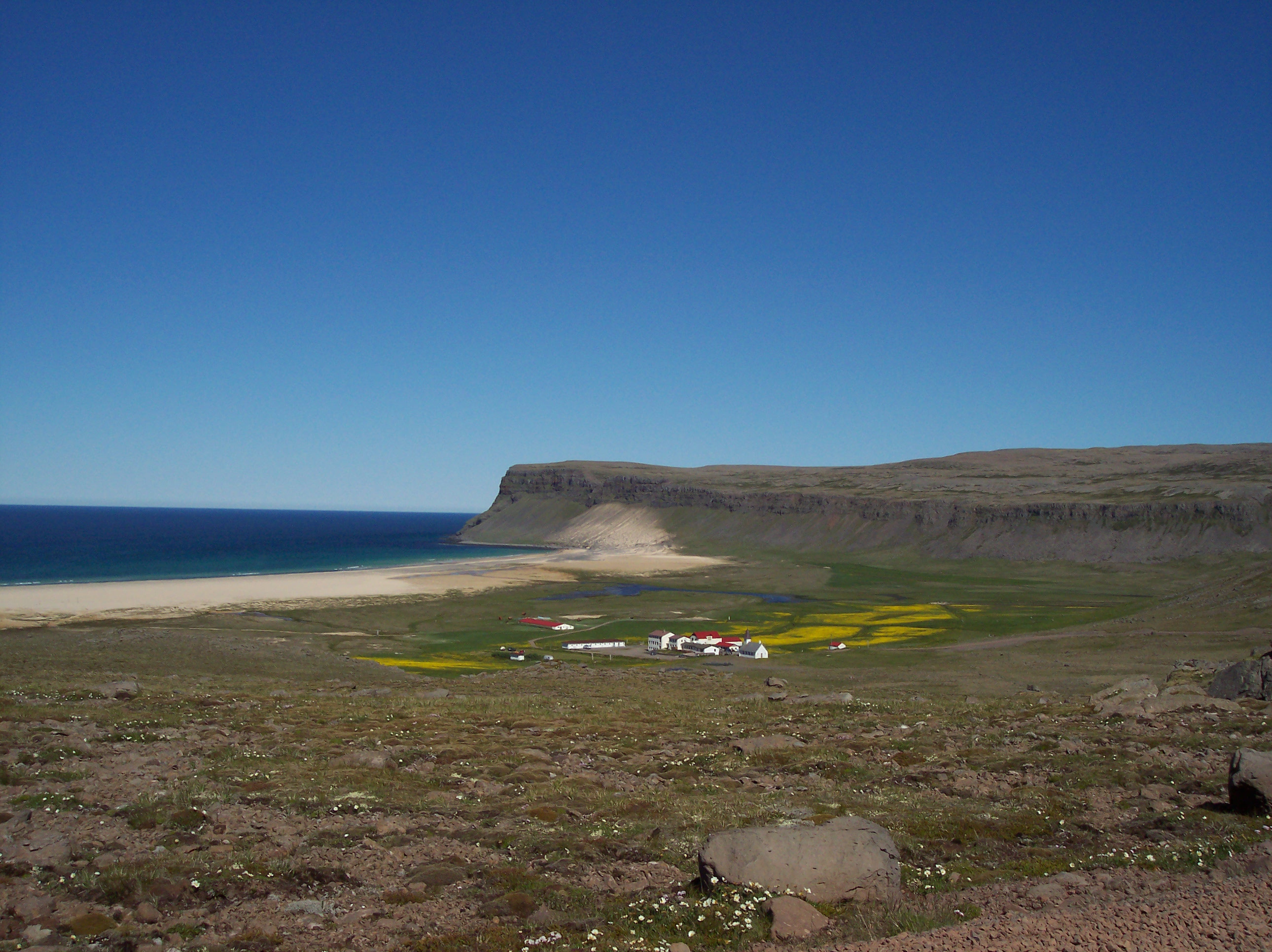 Breiðavík, Vestfjords, Iceland